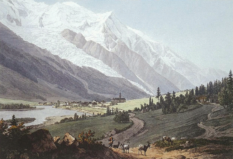 Scan de la gravue de Jean-Antoine Link (fin XVIIIè) intitulée "Le prieuré de Chamouni, le mont Blanc, l'aiguille du Goûter, le glacier des Bossons"